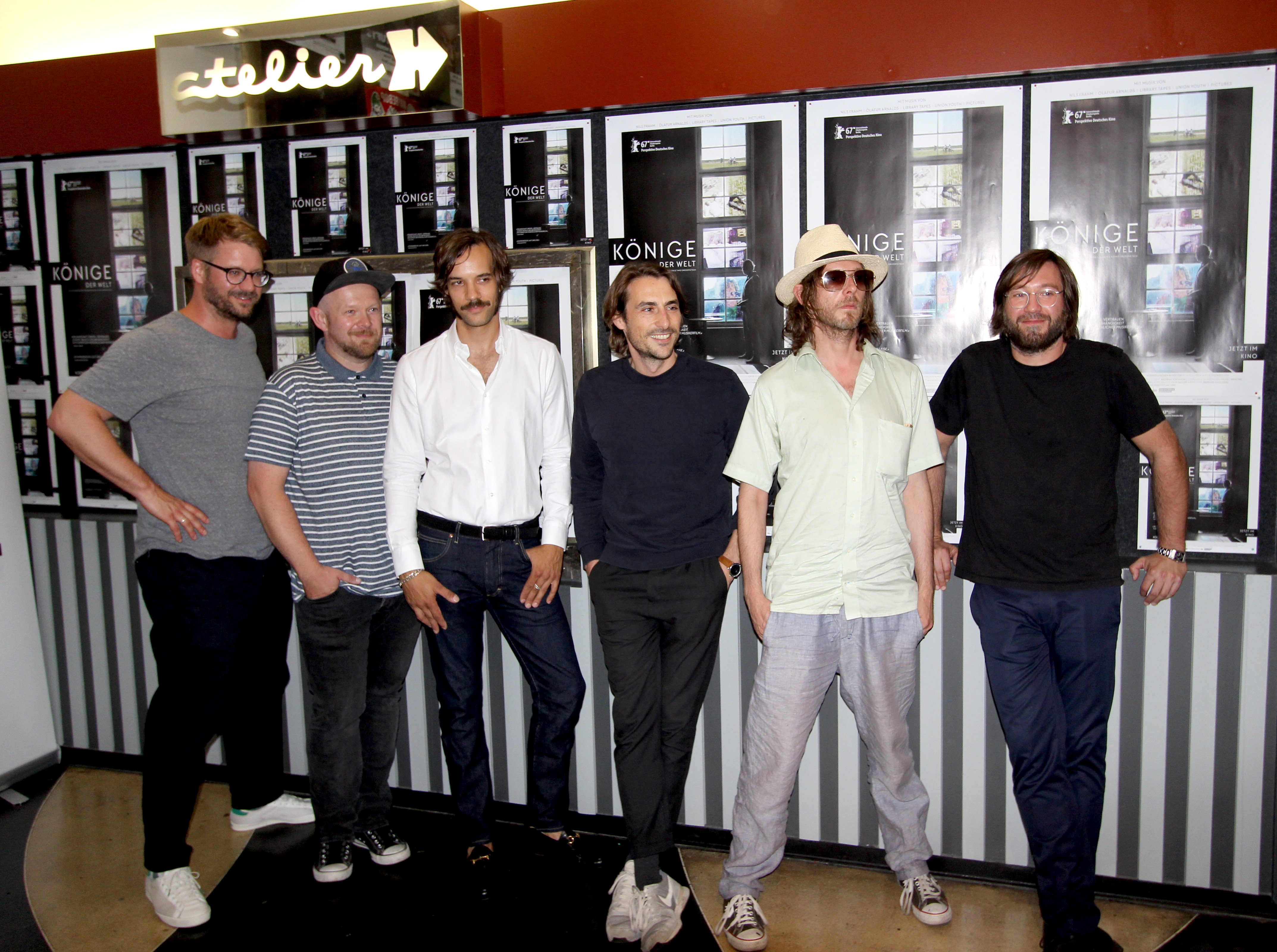 40210 Düsseldorf, Graf-Adolf-Str. 47, Premiere des Films am 05.07.2018 im Atelier-Kino Düsseldorf. Die Band 'Pictures' (ehemals 'Union Youth'). Personen v.l.n.r.: Timo Großpietsch (Regisseur), Ole Fries (Gitarre), Markus Krieg (Bass), Christian von Brockhausen (Regisseur), Matthias Exler (Gitarre, Gesang), Michael Borwitzky (Schlagzeug). Aufnahme 2018.